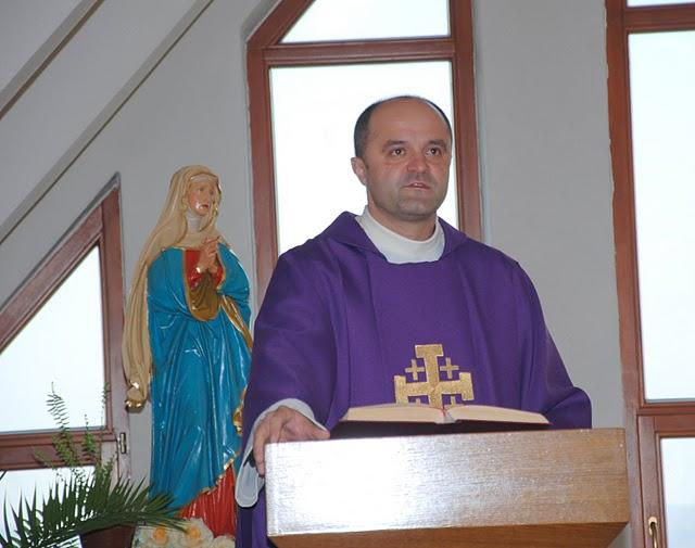 Rekolekcje (Lubaszowa) - 2011